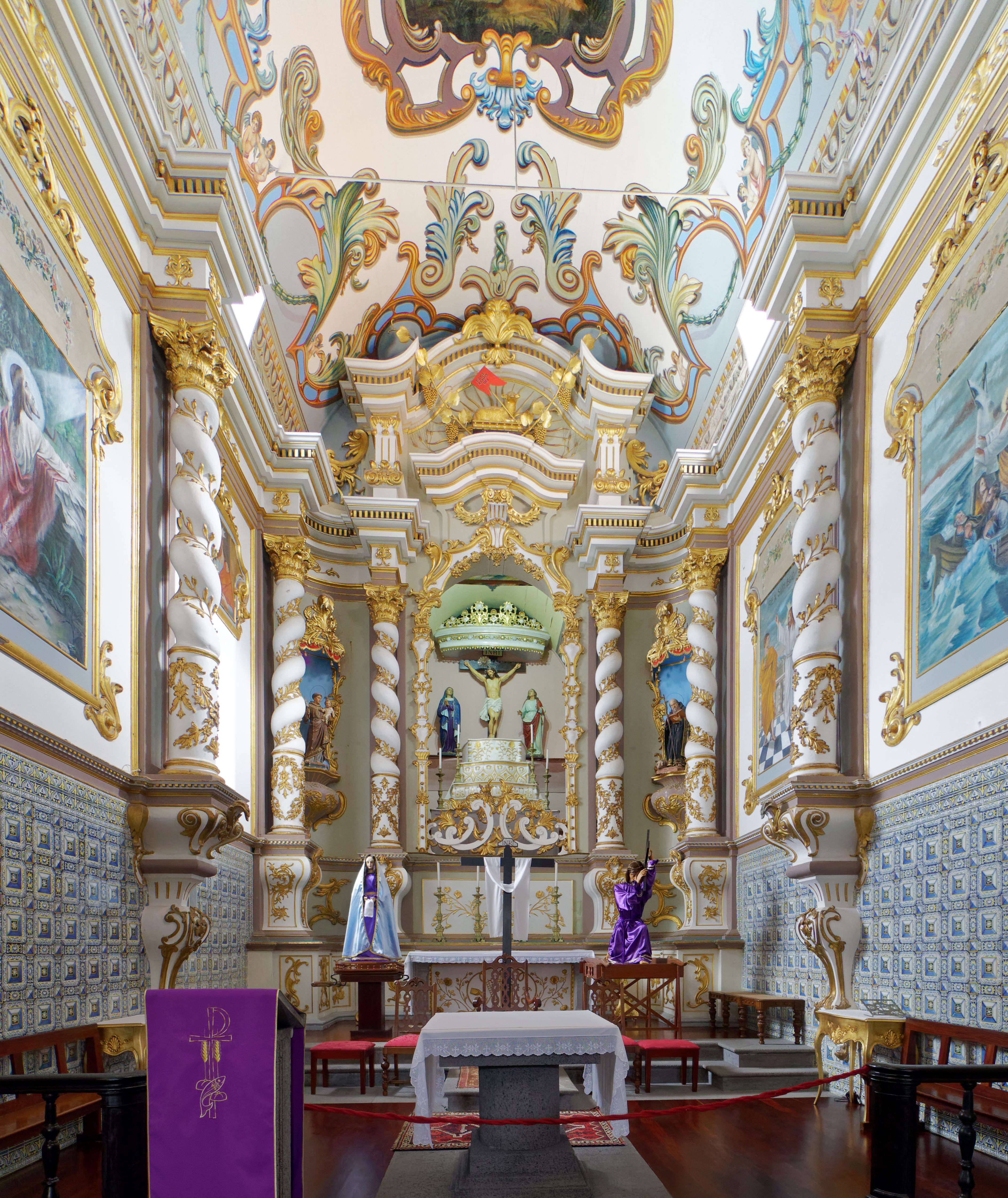 Igreja Senhor Bom Jesus.